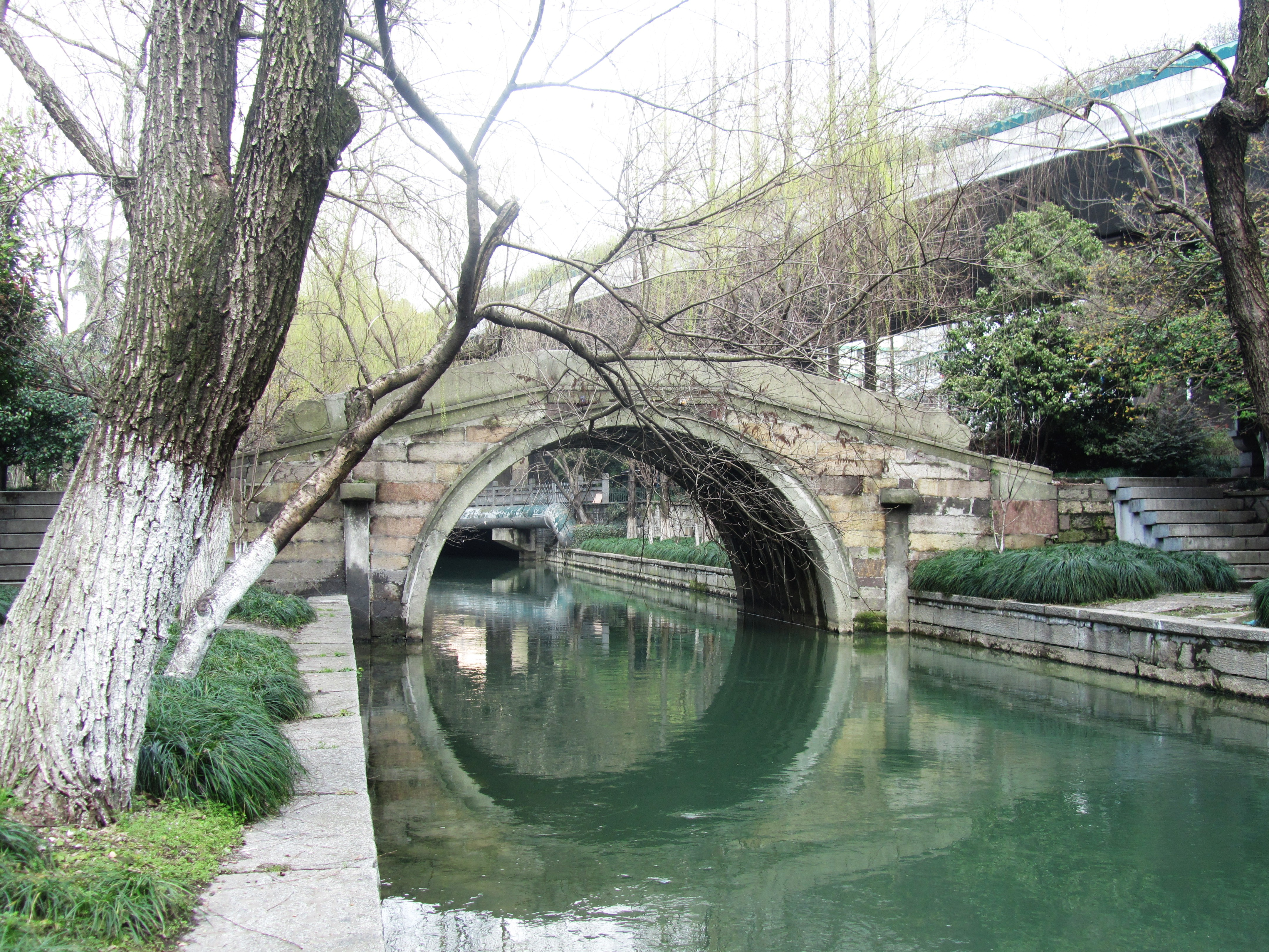 六部桥，自南侧看桥底。